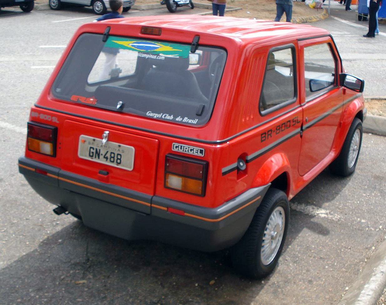 Gurgel BR-800 SL at a Gurgel Club meet